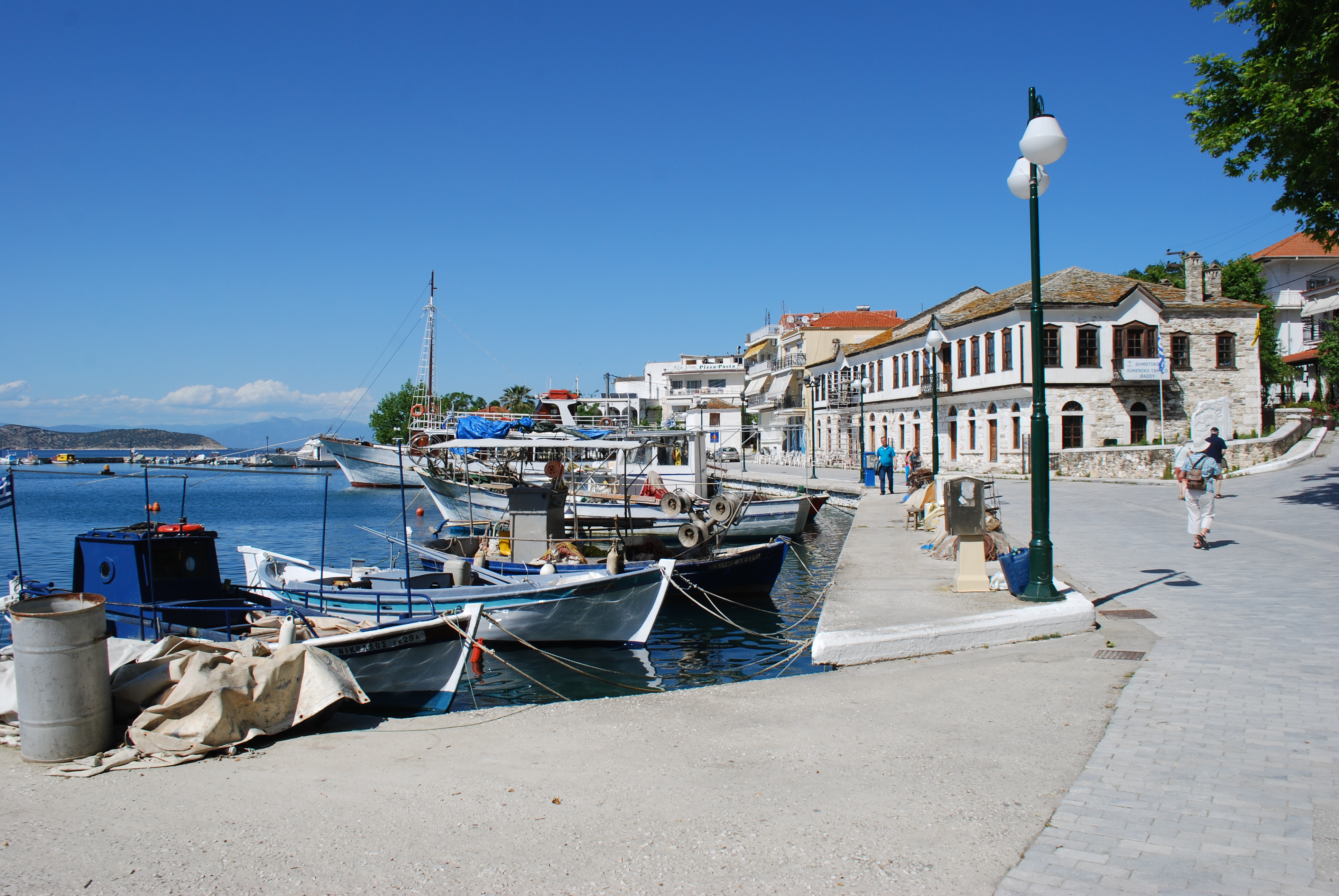 Vue de Limenas, dans l'île de Thasos (Grèce).